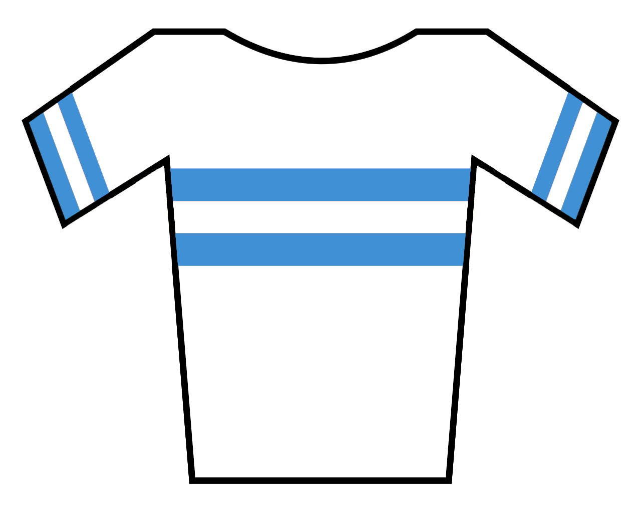 Maillot para el campeon argentino de ciclismo en ruta y/o contrarreloj.